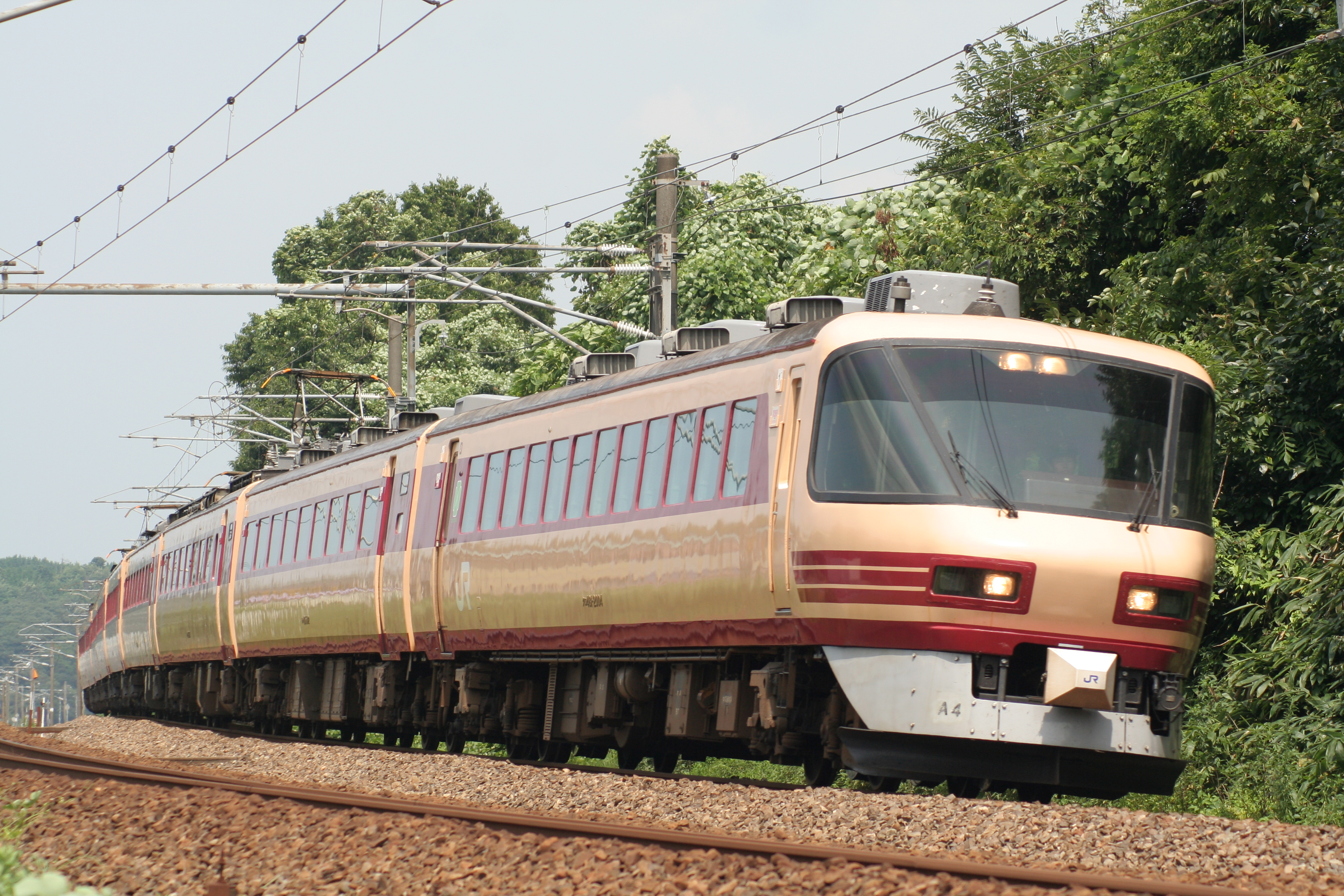 JR西日本485系電車特急雷鳥号 北陸本線、細呂木駅周辺 A4編成（パロラマ側）